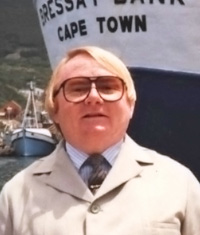 Depicted person: Zdzisław Świderski – Polish parasitologist